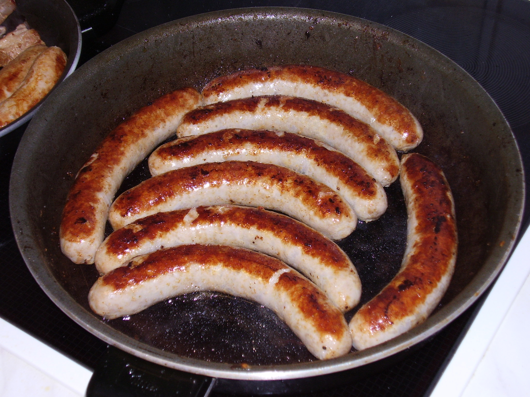 Grobe Bratwürste in der Pfanne; verzehrfertig ;-)